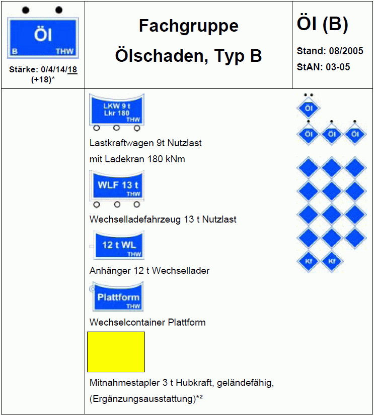 StAN des Technisches Hilfswerk über Fahrzeuge der Fachgruppe Ölschaden Typ B